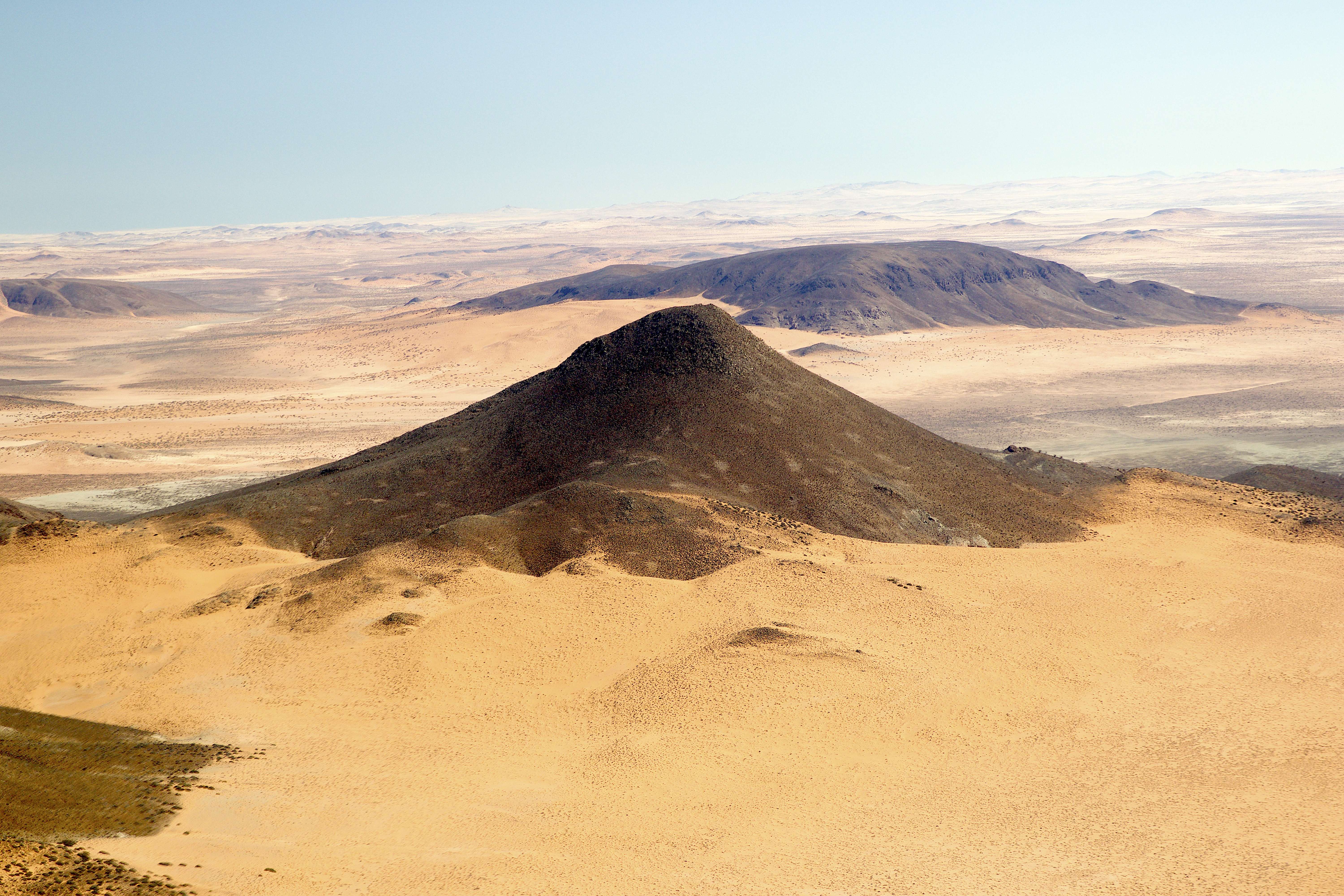 Höchster im Sperrgebiet Luftaufnahme 2018